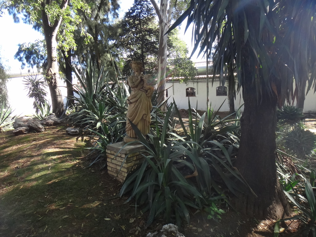 Exteriores del Museo de la Atalaya in Jerez de la Frontera